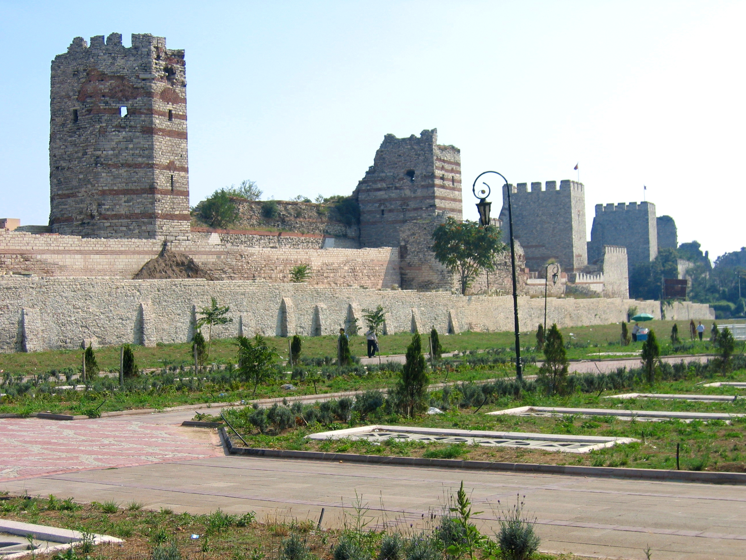 Bildbeschreibung: Große Landmauer, Istanbul, Türkei Fotograf: selbst fotografiert von Johann H. Addicks Genehmigung: GFDL, kein wie auch immer geartetes "Gentlemen-Agreement". Bildnutzung ohne Einhaltung der Bestimmungen der GFDL ist kostenpflichtig und wird vom Rechteinhaber in Rechnung gestellt. Zweitlizensierung auf Anfrage. Es gelten die AGB. Datum: 2004